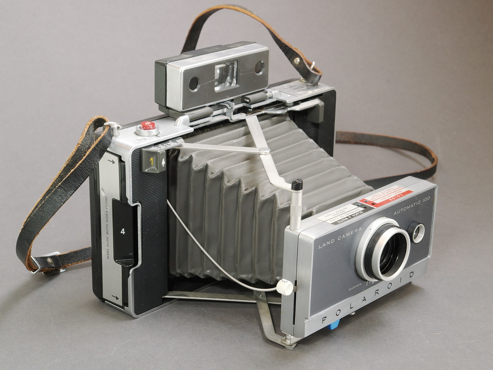 Polaroid Land Camera Automatic 100